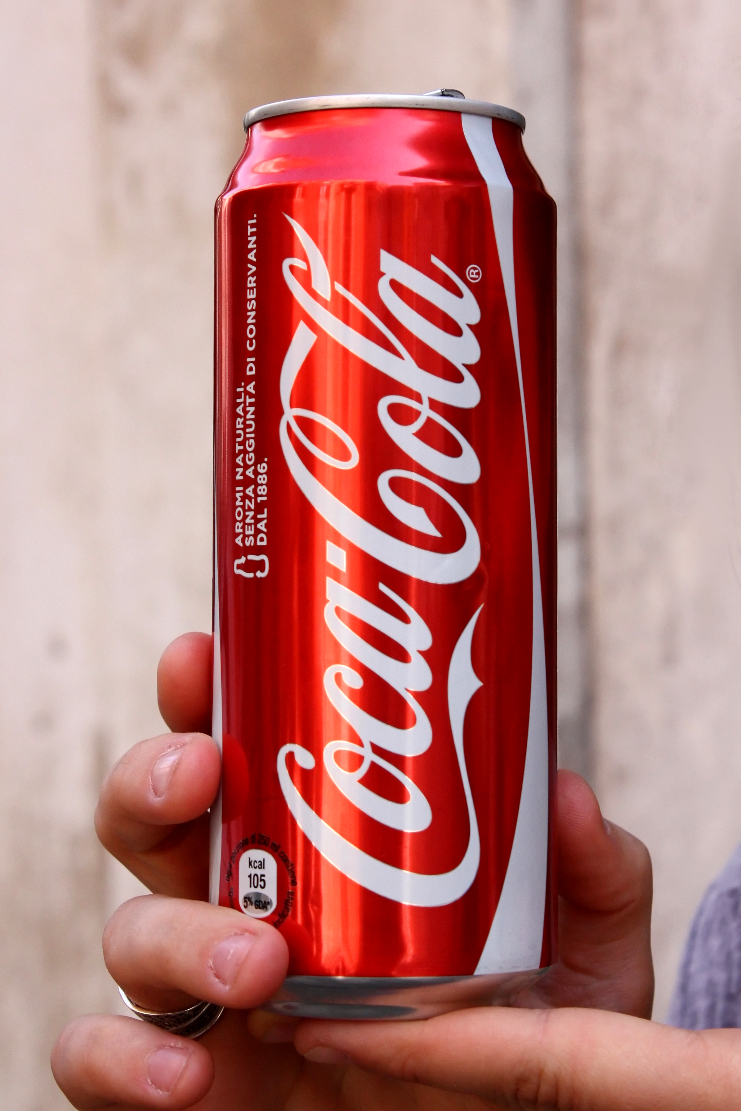 Une cannette de Coca-Cola italienne d'une contenance de 50cl.